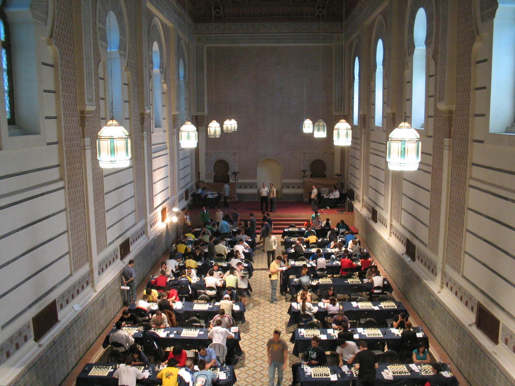 Campeonato de España de Ajedrez Universitario